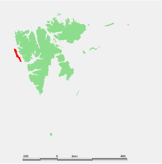 Svalbard Islands - Russia - Spitsbergen - Prins Karls Forland.PNG